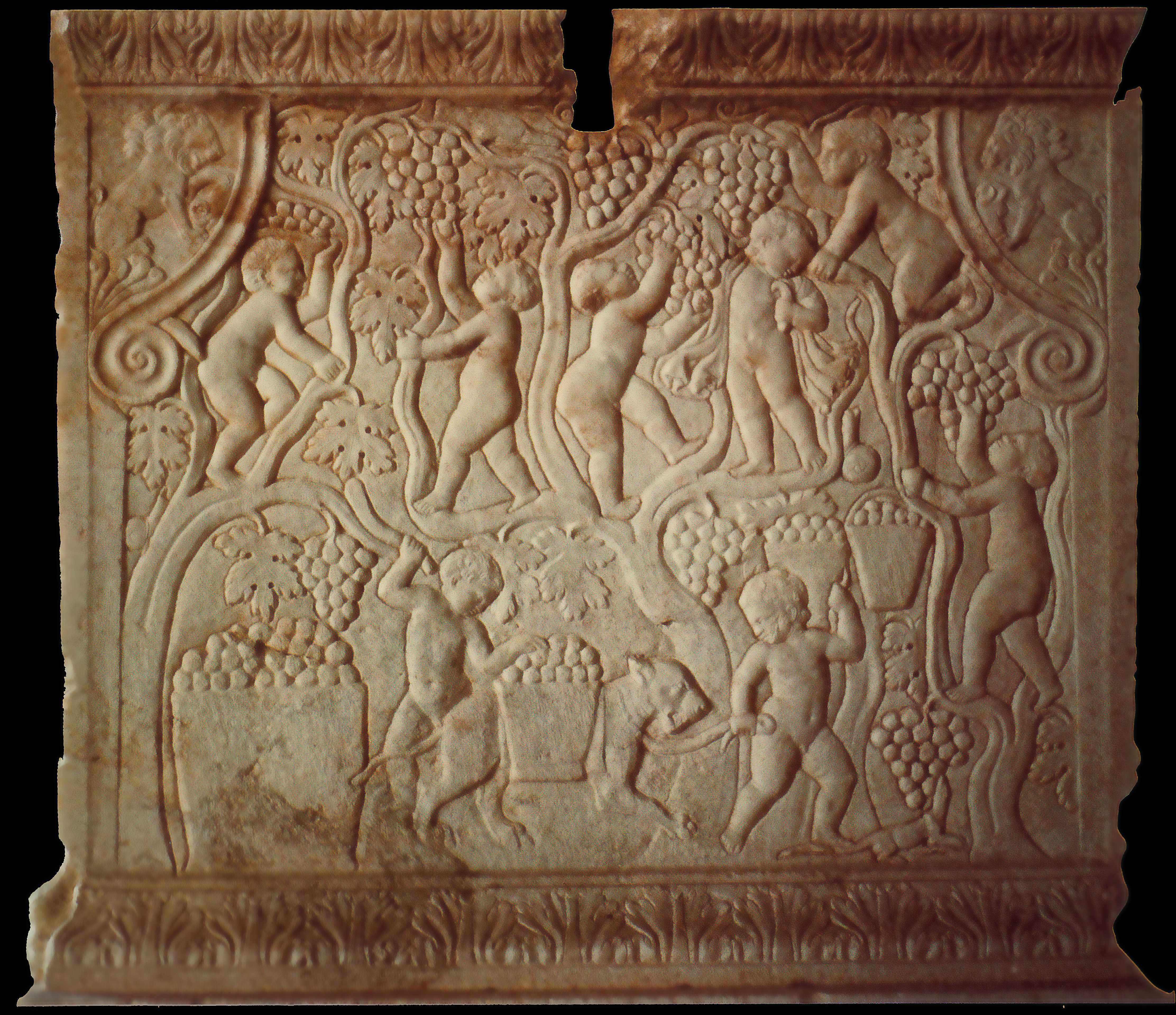 Croatie Amours vendangeurs sarcophage attique de Salone IIIe s Musée de Split